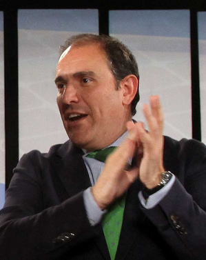 Javier Bello en un acto de bienvenida a nuevos afiliados del Partido Popular.